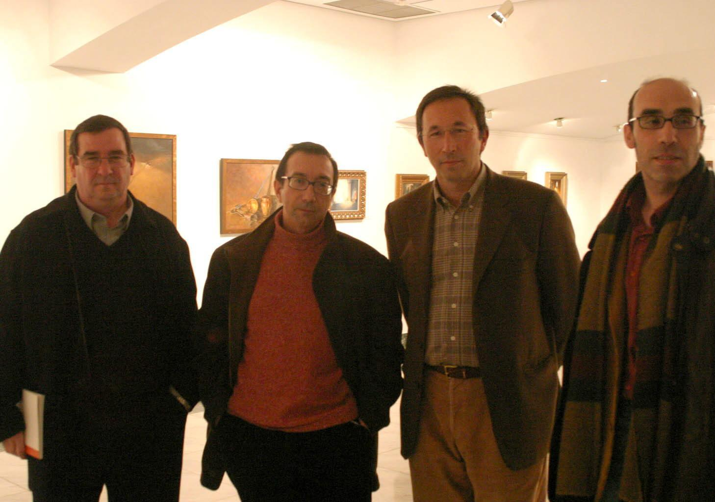 Integrantes del grupo Magua Sociedad Literaria